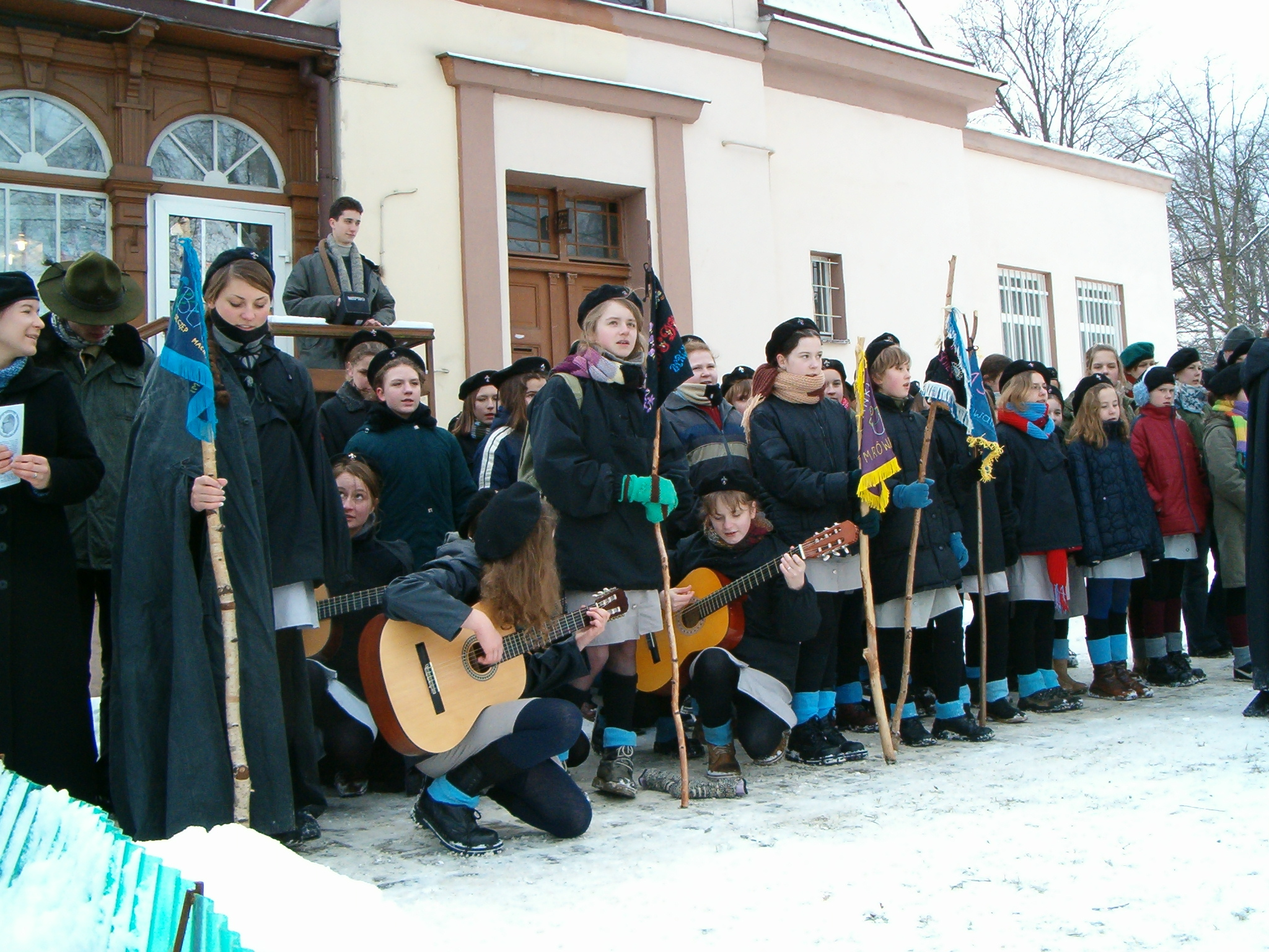 Uroczystość odsłonięcia pomnika harcmistrza Michała Urbanka